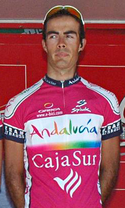 Antonio Piedra. Andalucía-Cajasur, Euskal Bizikleta 2008